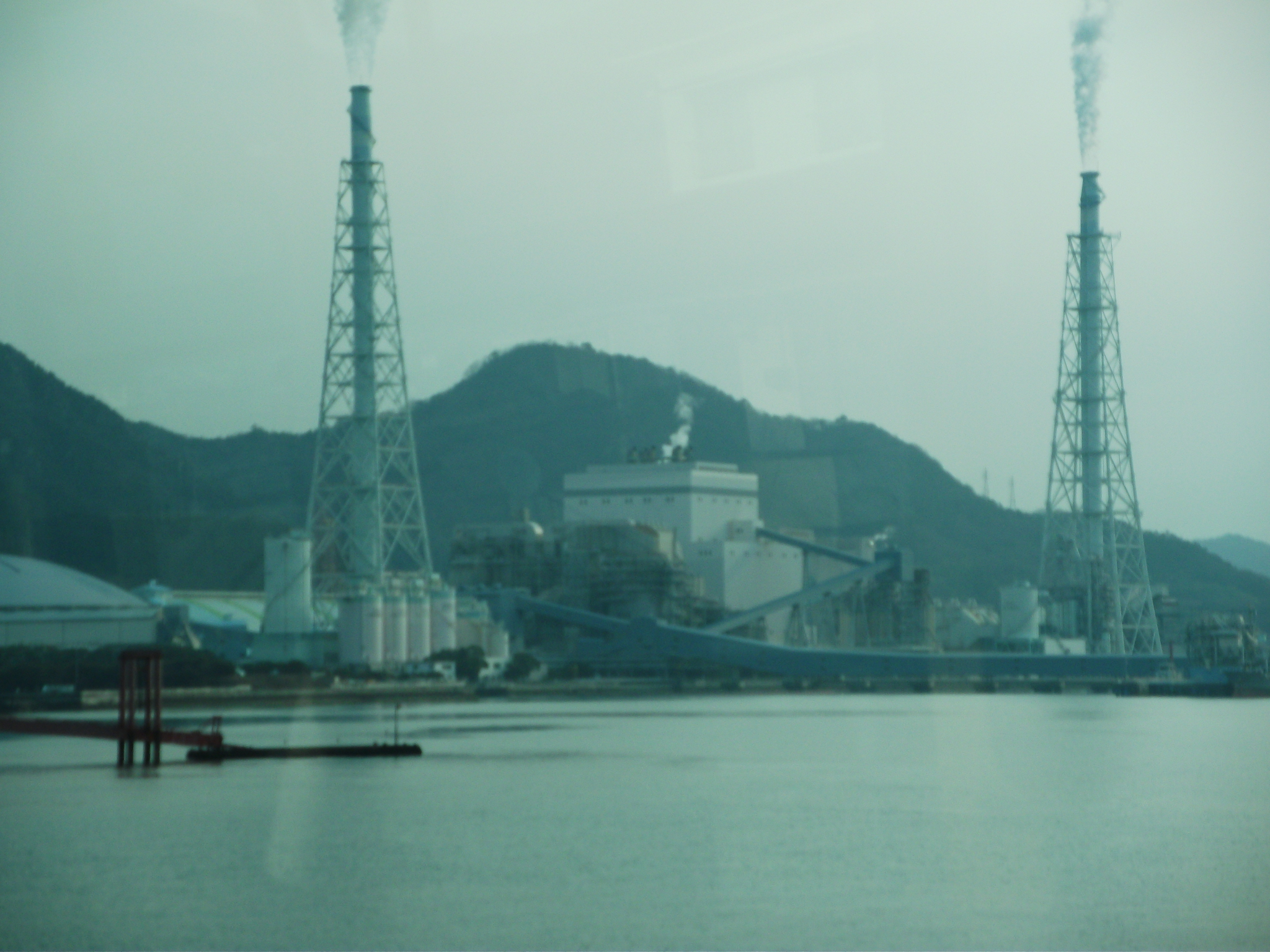 広島県竹原市、電源開発竹原火力発電所（バス車中から撮影）